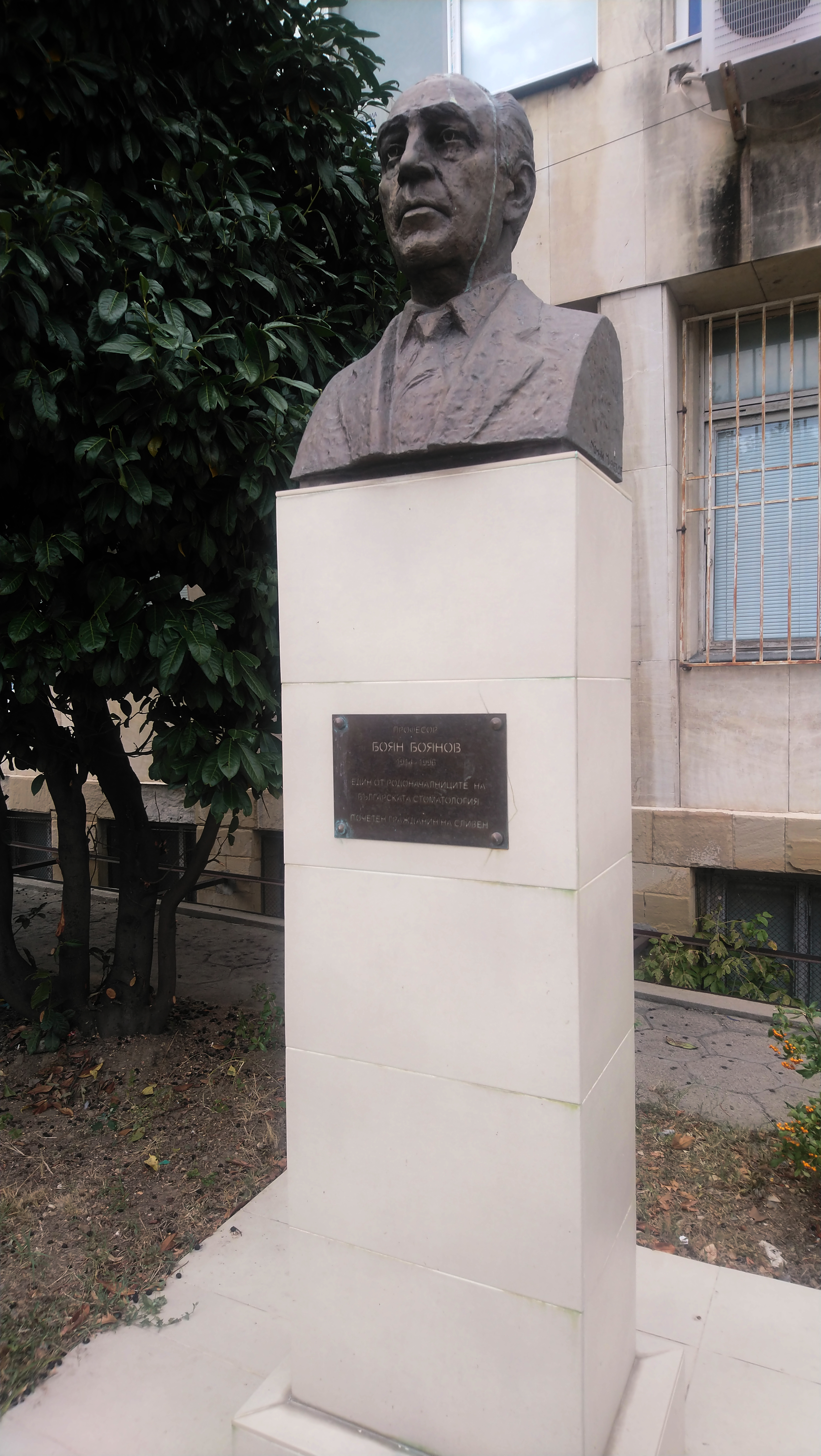 Бюст-паметник на един от родоначалниците на българската стоматология, професор Боян Боянов (1914-1996), почетен гражданин на Сливен